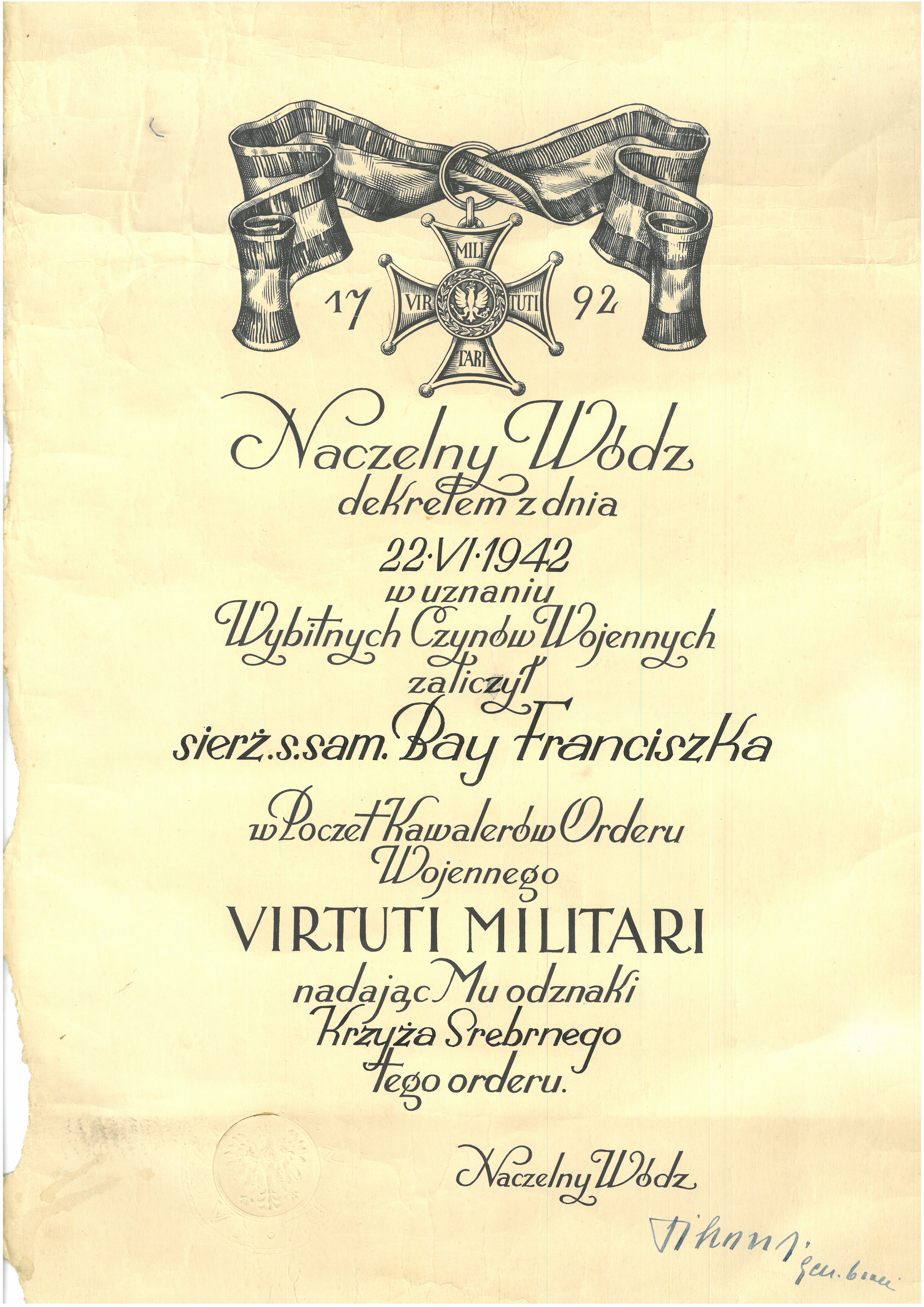 Odznaczenie Krzyżem Srebrnym Virtuti Militari